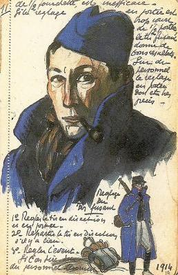 Autoportrait André Mare, Carnets de guerre